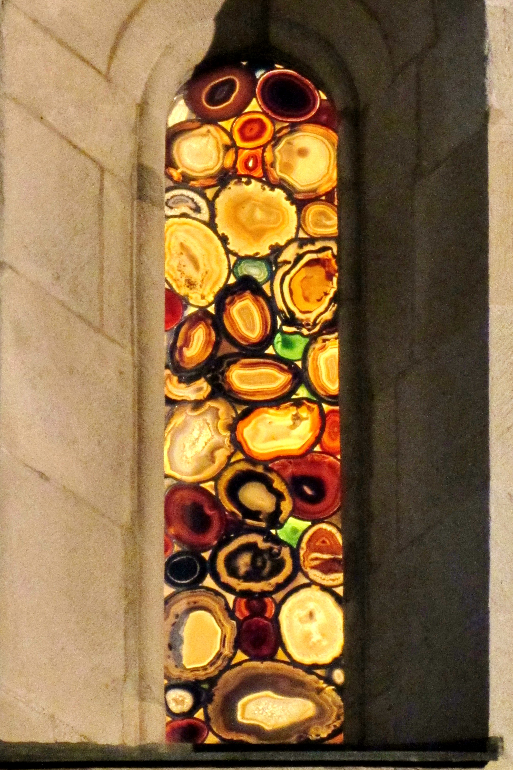 Grossmünster in Zürich (Switzerland)